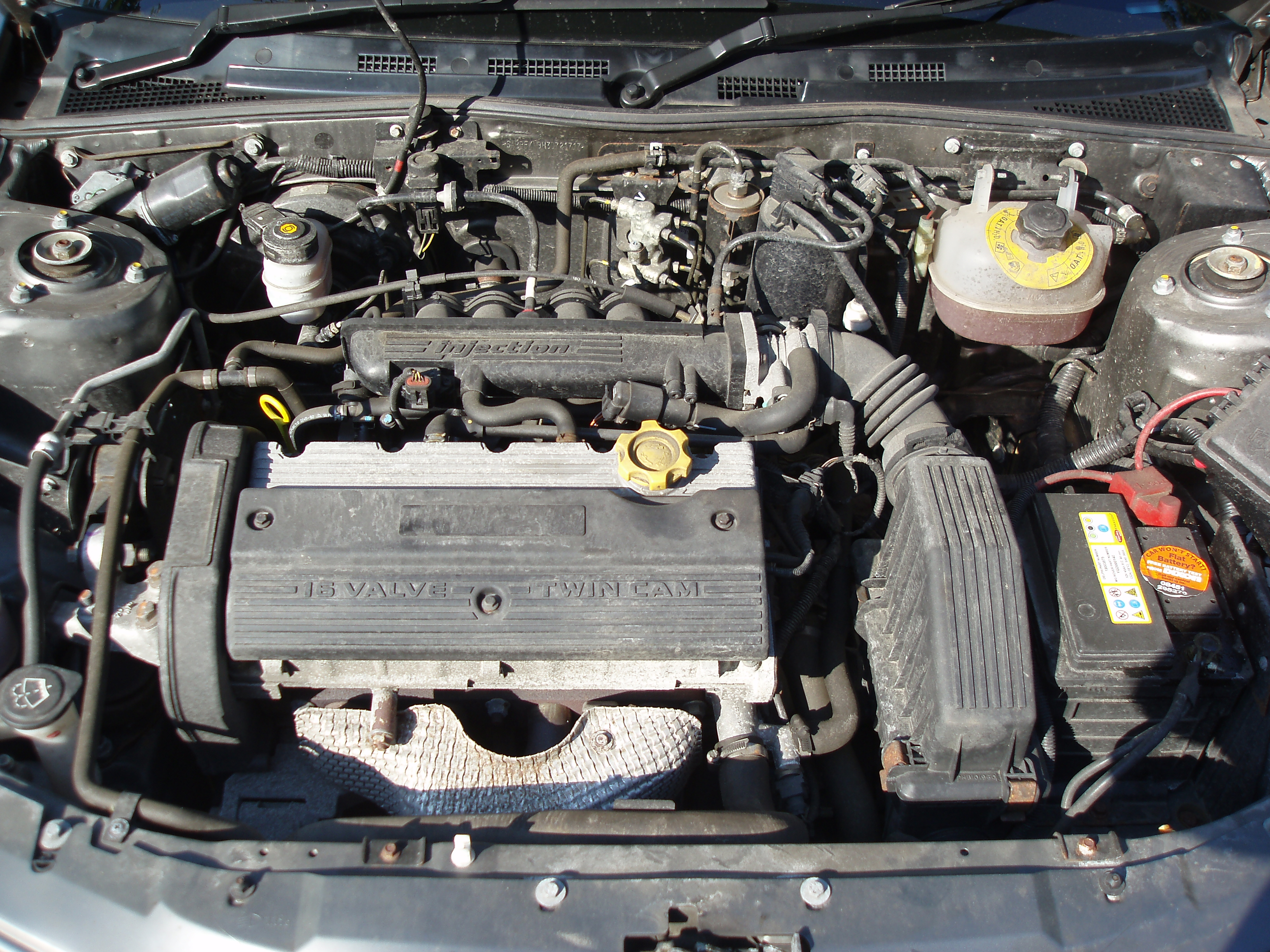 A 1.4 litre DOHC Rover K-Series engine in an MG ZR.